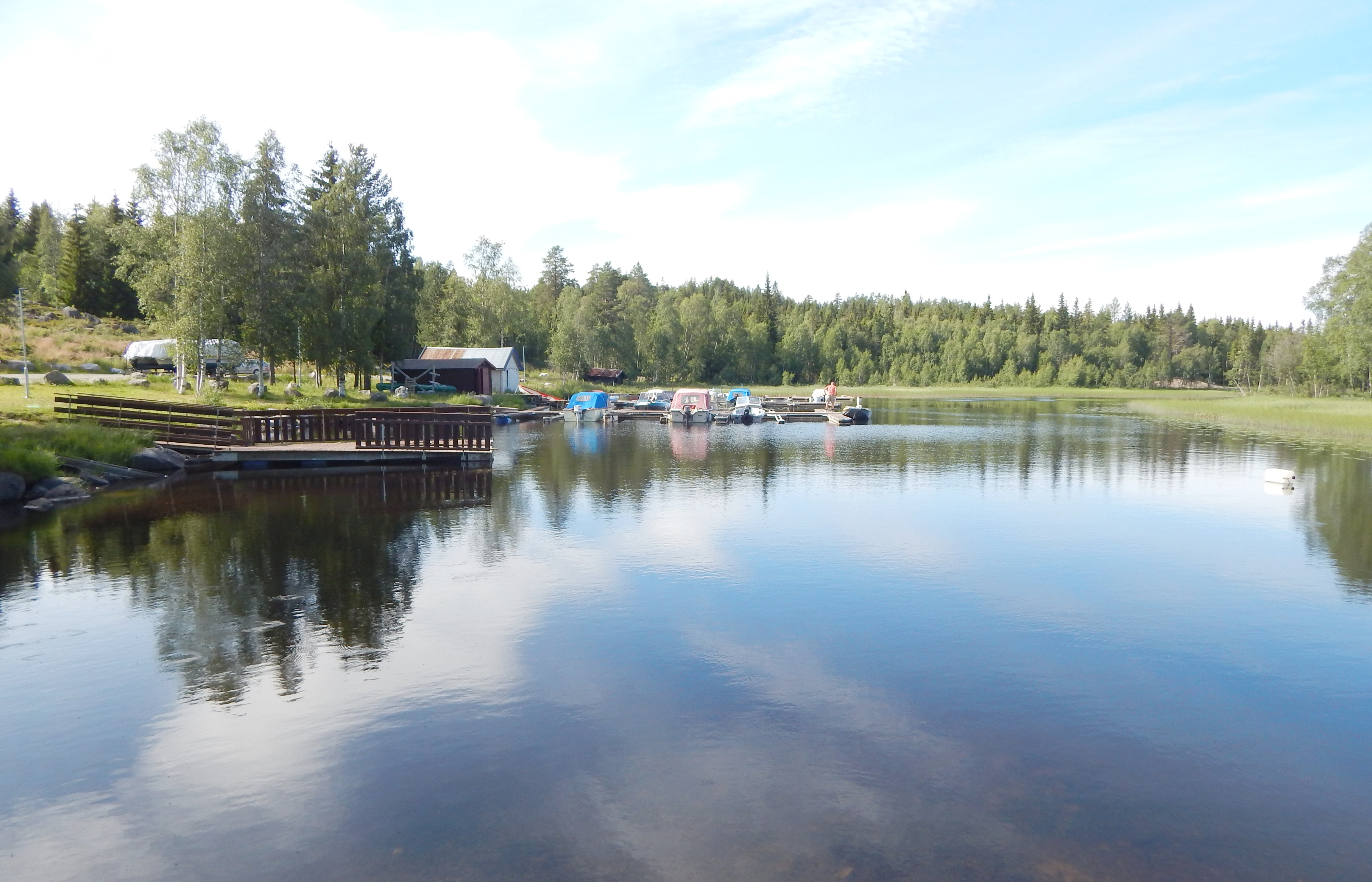 Næra nær Næroset